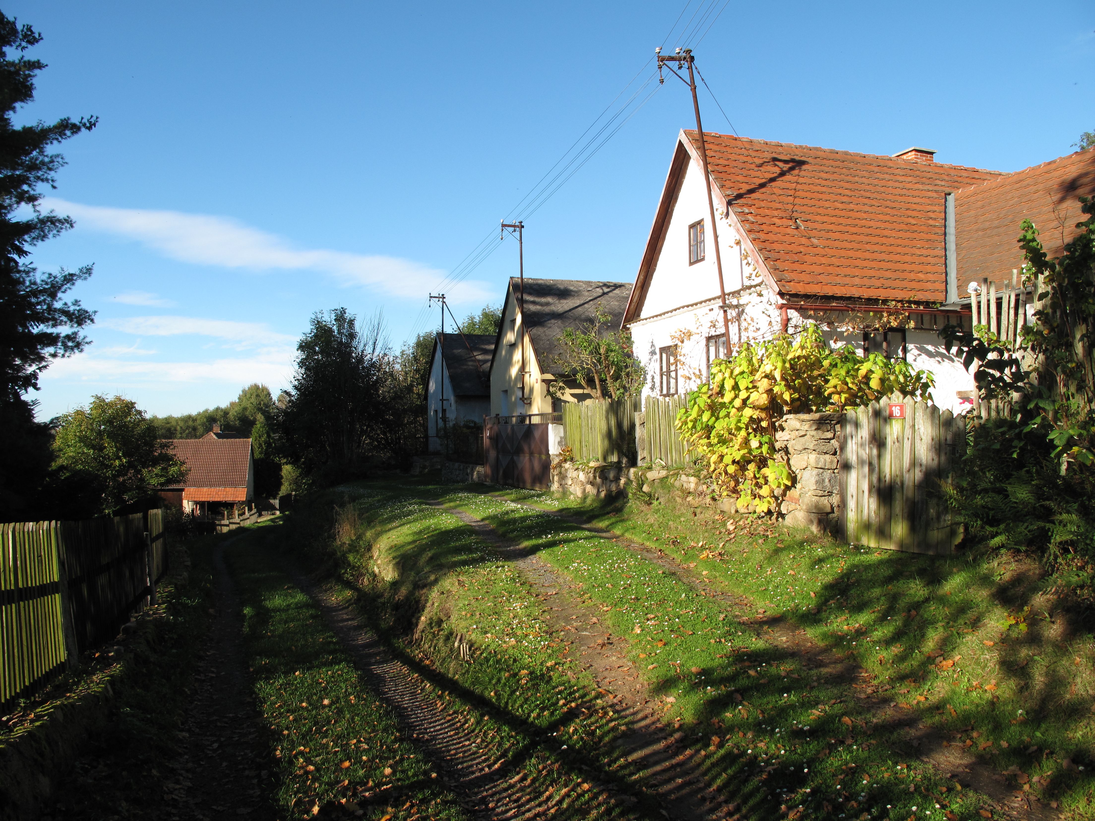 Domy v Malkovicích. Okres Příbram, Česká republika.